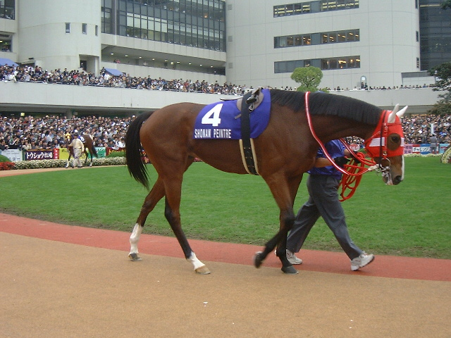 ショウナンパントル